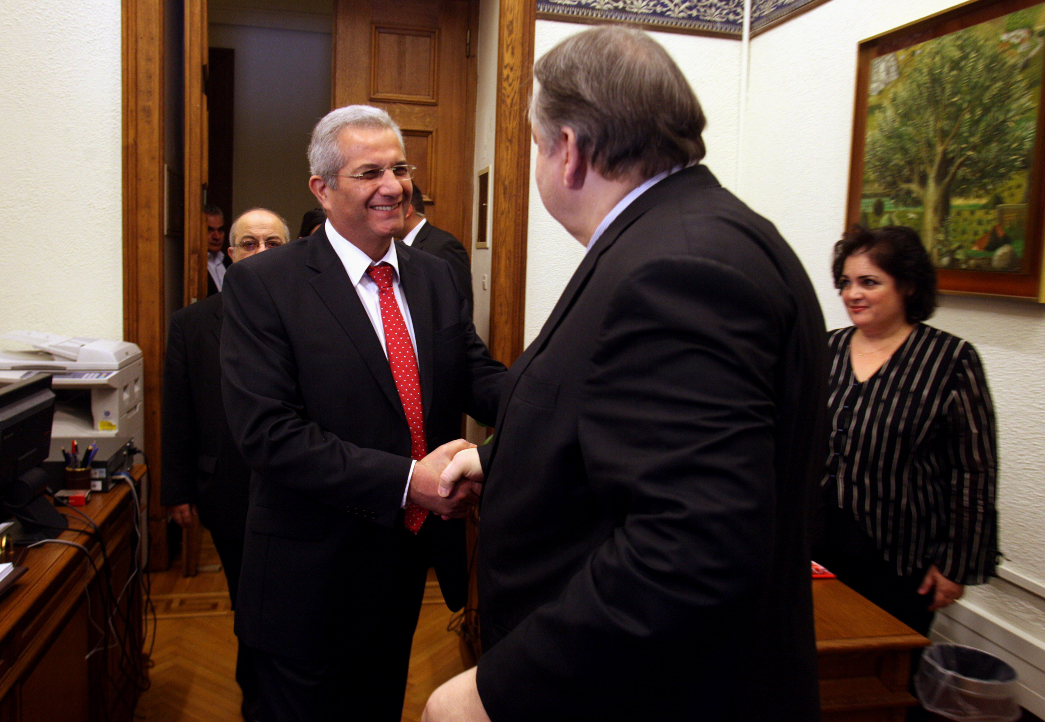 ΣΥΝΑΝΤΗΣΗ ΤΟΥ ΠΡΟΕΔΡΟΥ ΤΟΥ ΠΑΣΟΚ ΕΥΑΓΓΕΛΟΥ ΒΕΝΙΖΕΛΟΥ ΜΕ ΤΟΝ ΓΕΝΙΚΟ ΓΡΑΜΜΑΤΕΑ ΤΟΥ ΑΚΕΛ ΑΝΤΡΟ ΚΥΠΡΙΑΝΟΥ